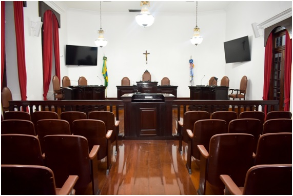 Plenário do TM